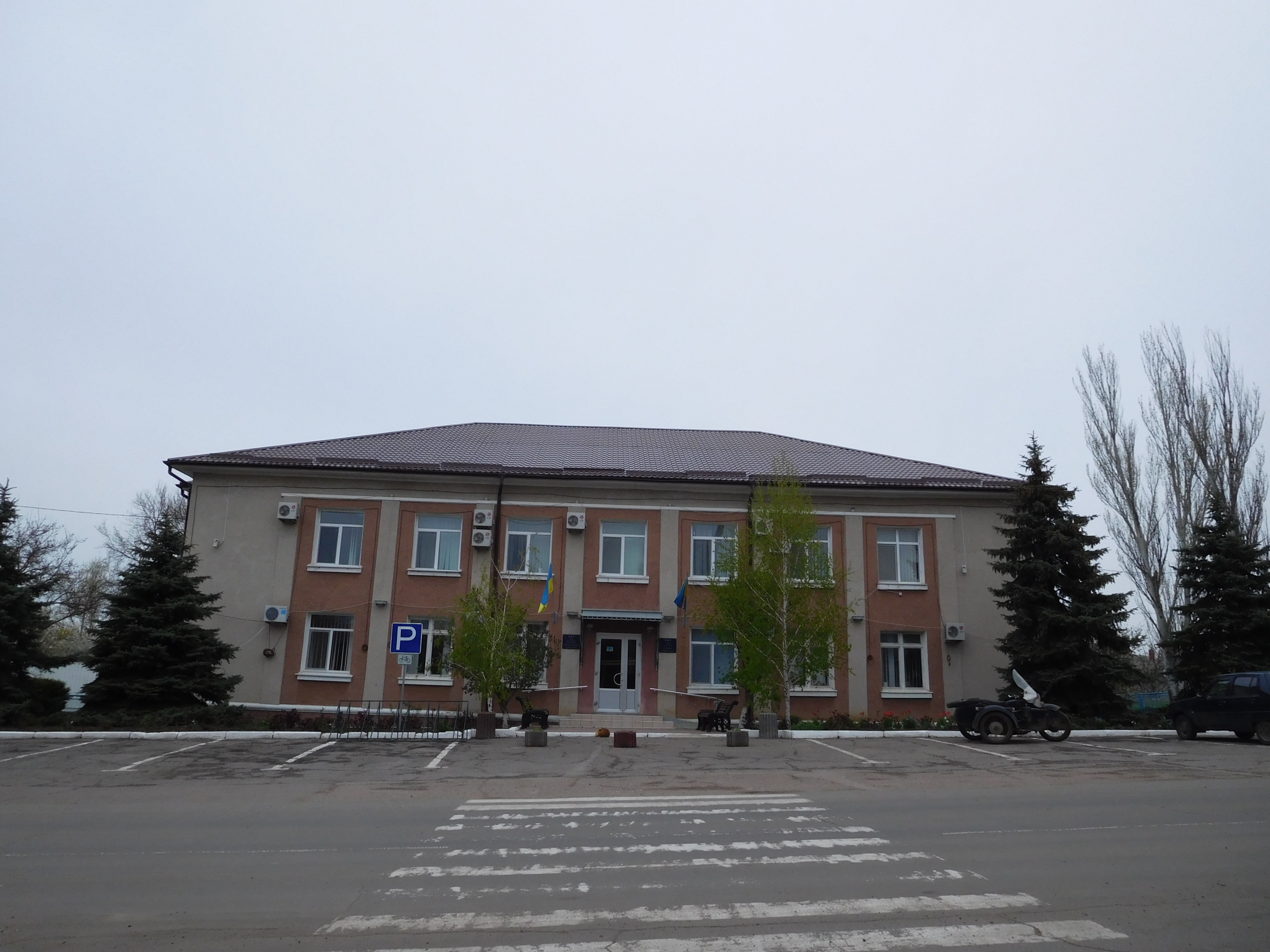 смт Доброслав, Одеська область, Україна